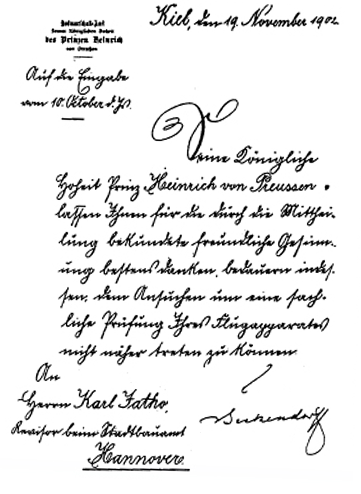 Seckendorff antwortet am 19. November 1902 aus Kiel für Prinz Heinrich von Preussen auf eine Eingabe vom 10. Oktober 1902 von Herrn Karl Jatho, Revisor beim Stadtbauamt Hannover. Text: Seine königliche Hoheit Prinz Heinrich von Preussen lassen Ihnen für die durch die Mittheilung bekundete freundliche Gesinnung bestens danken, bedauern indessen, dem Ansuchen um eine sachliche Prüfung Ihres Flugapparates nicht näher treten zu können.